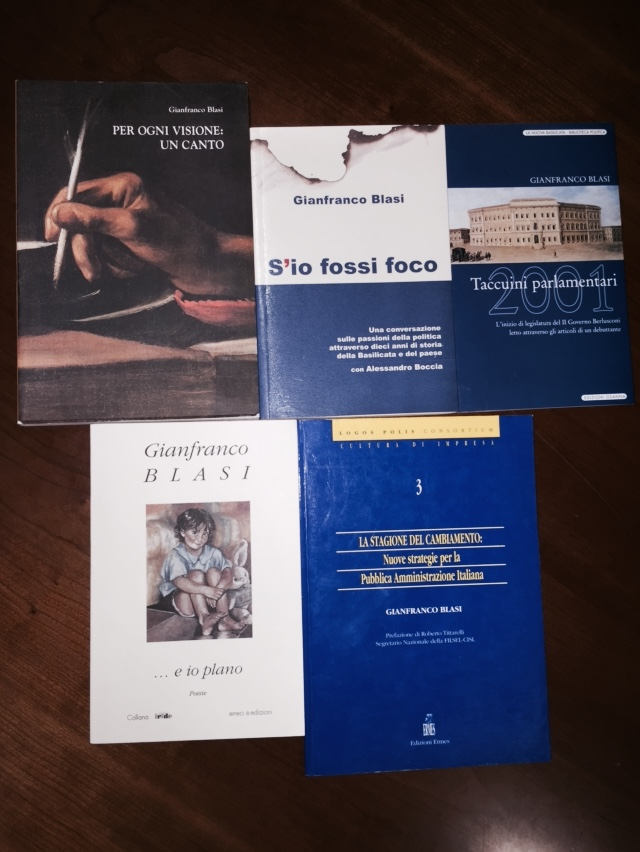 Foto pubblicazioni libri